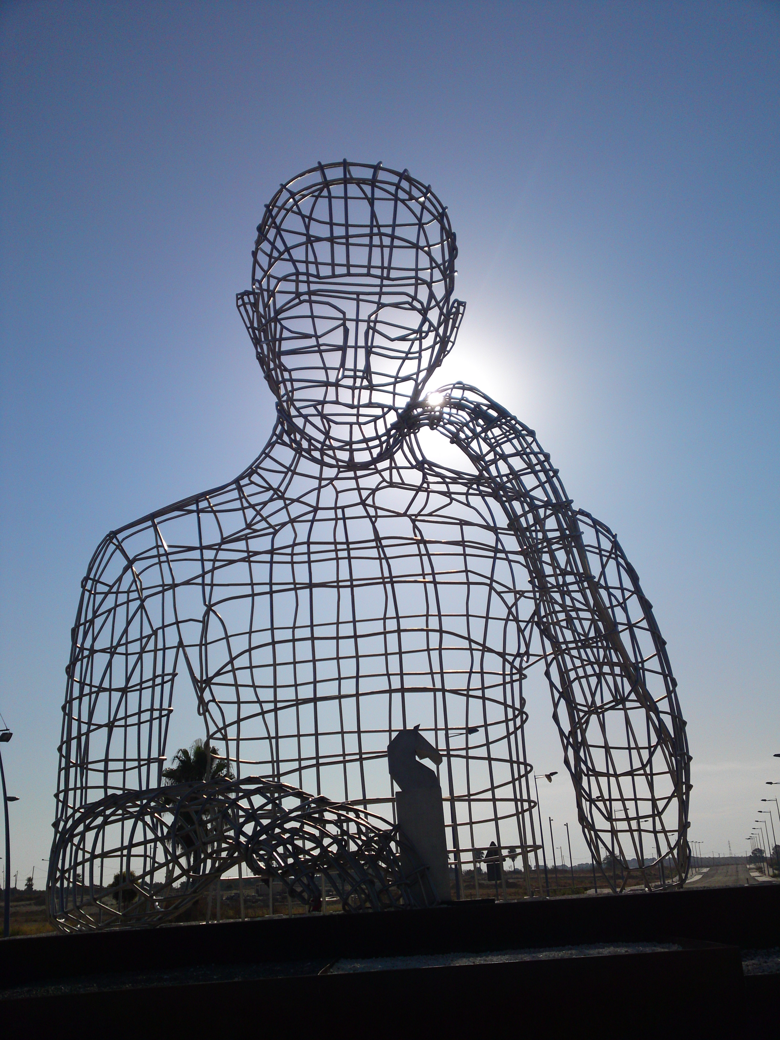 Monumento al Ajedrez en la av. Felipe González Márquez en Dos Hermanas - Sevilla - Andalucía - España